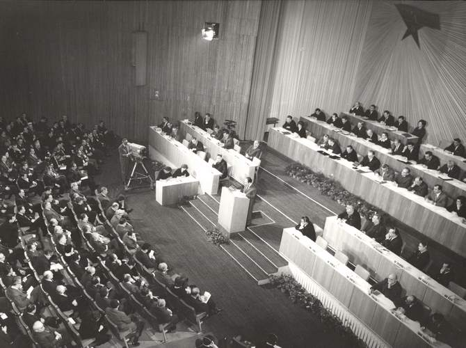 Srpski (latinica): Osmi kongres SKJ u Beogradu 1964. godine